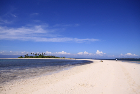 필리핀 보홀 버진 아일랜드 (Bohol Virgin Islands)